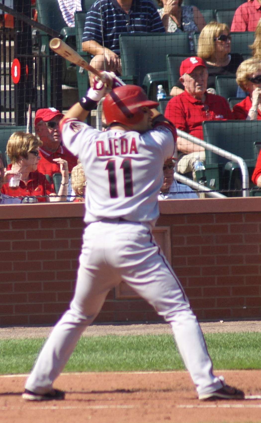 Augie Ojeda